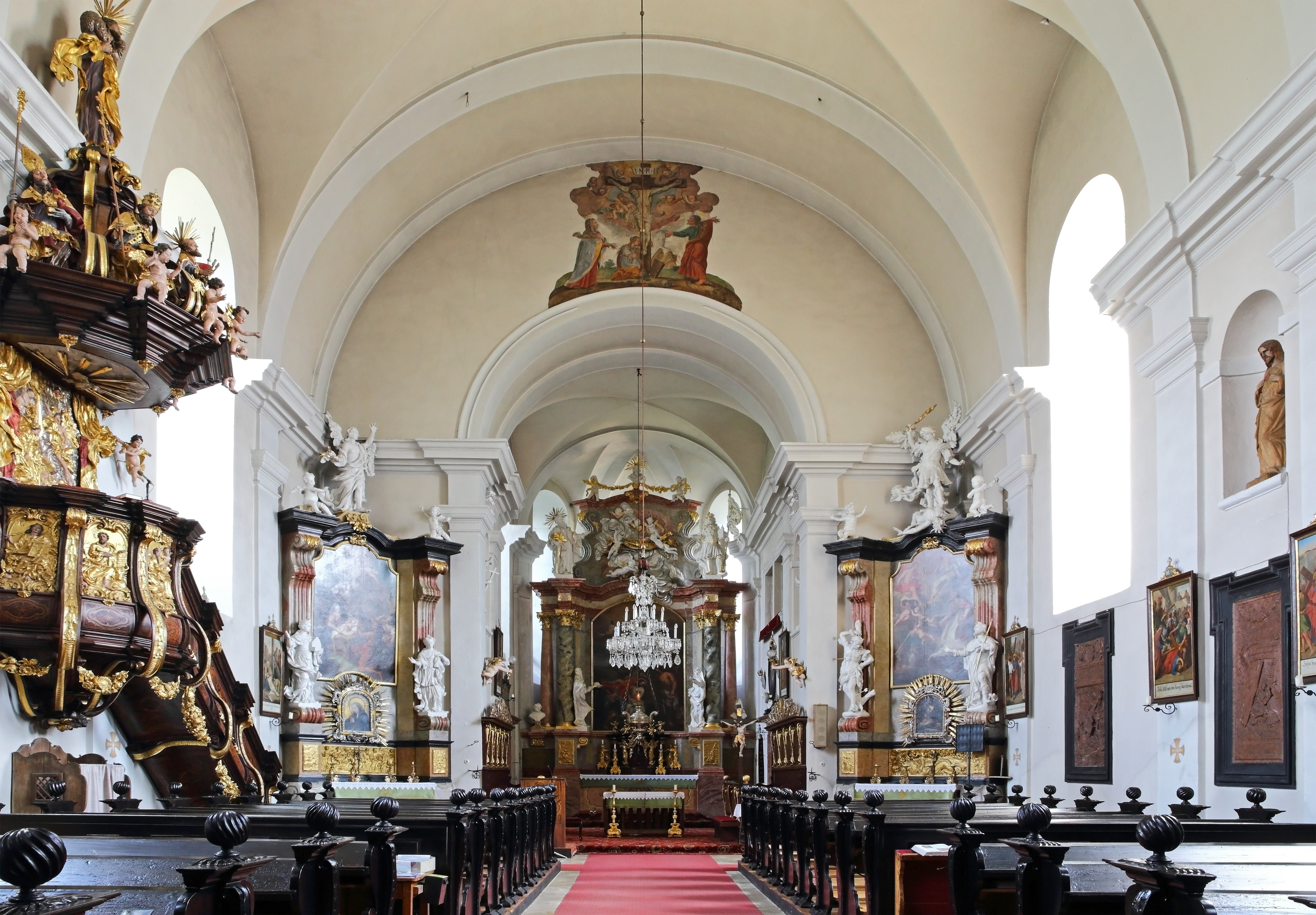 Pfarrkirche Kirchberg am Walde - Innen